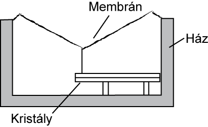 Piezo mikrofon